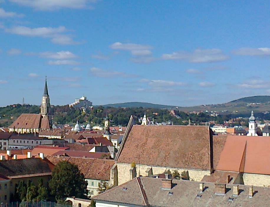 Kolozsvár a Sapientia Tordai út épületéből